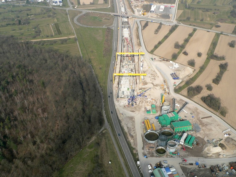 Luftaufnahme: Rastatter Tunnel